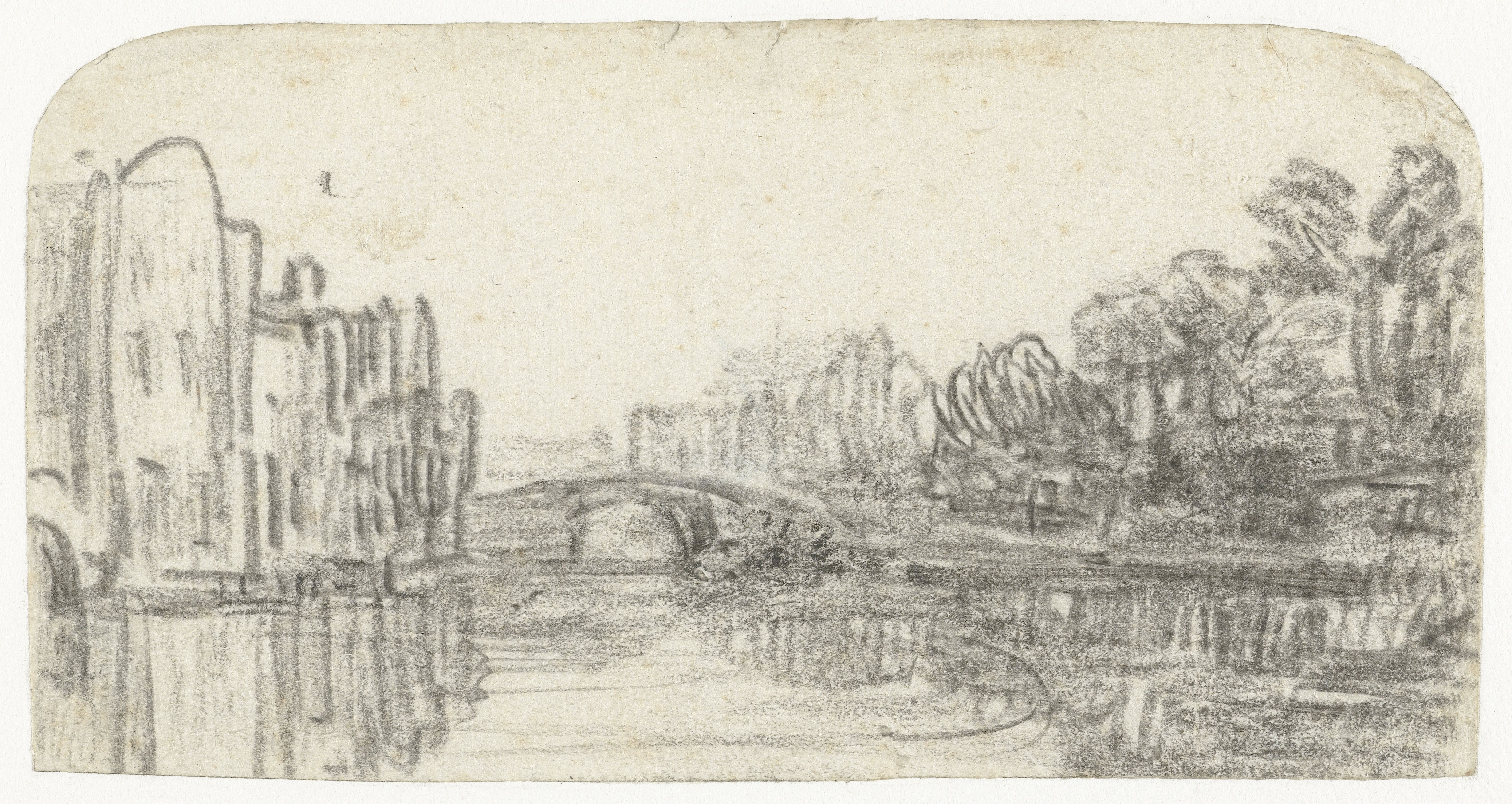 Gezicht op de Nieuwezijds Voorburgwal in Amsterdam. black chalk on paper. Height: 8.6 cm (3.3 ″); Width: 16.4 cm (6.4 ″) dimensions QS:P2048,8.6U174728;P2049,16.4U174728. Amsterdam, Rijksmuseum Amsterdam.